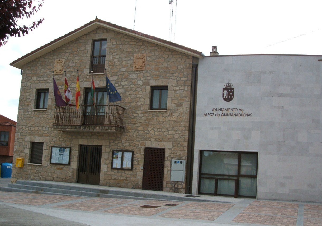 Ayuntamiento